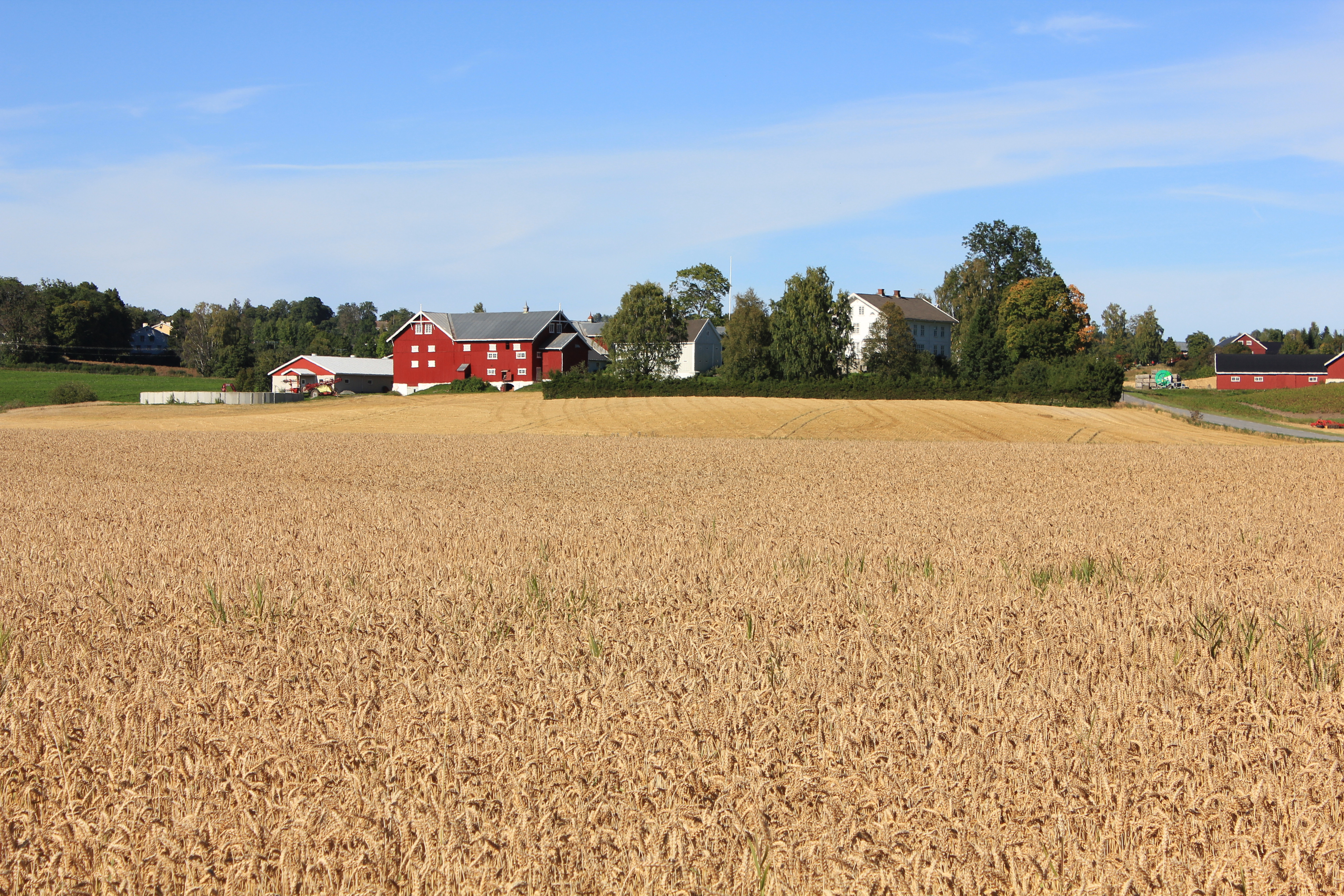 Slagsvold gård på Østre Toten.